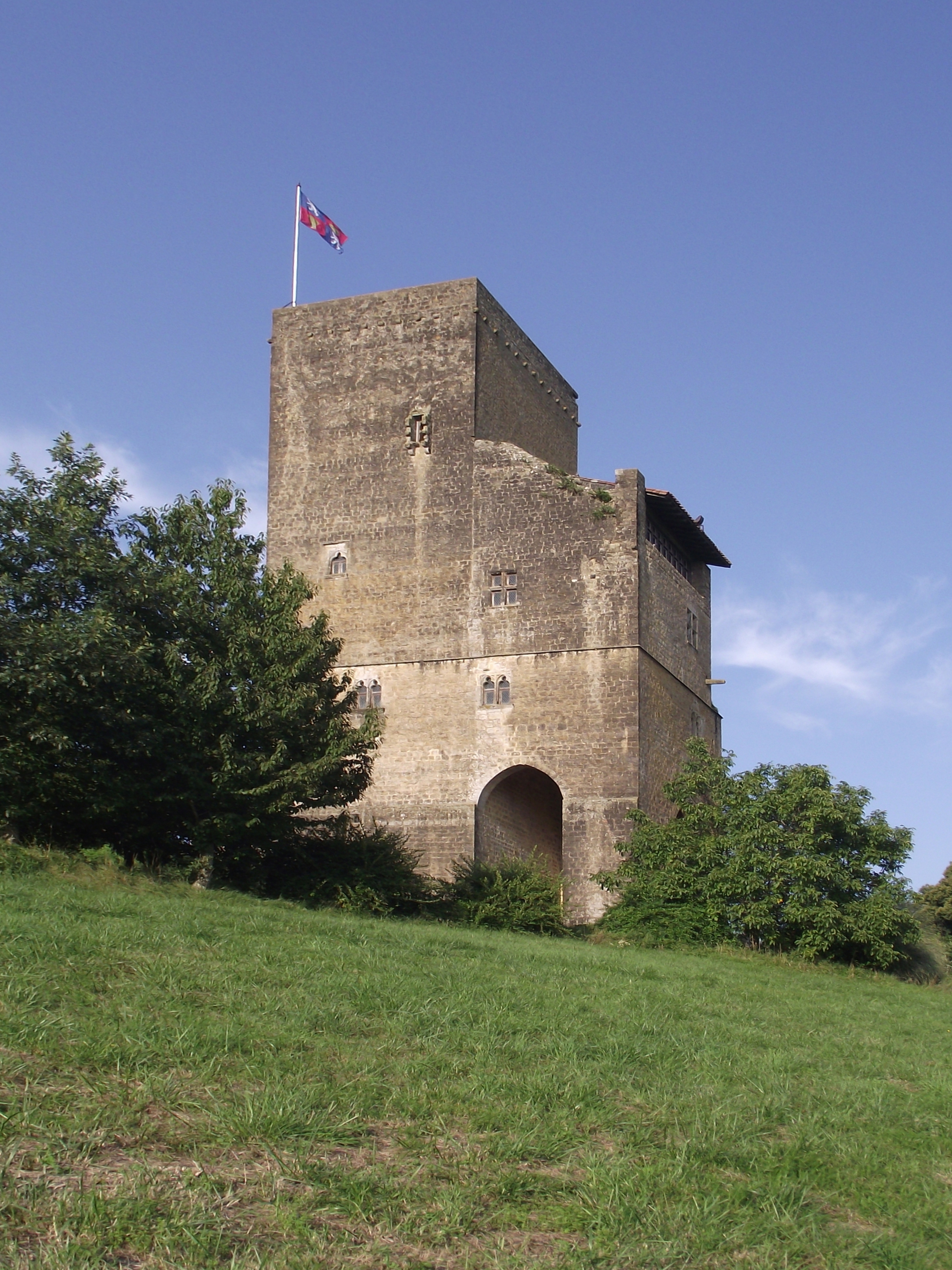 Tour de Termes d'Armagnac (Gers, France)